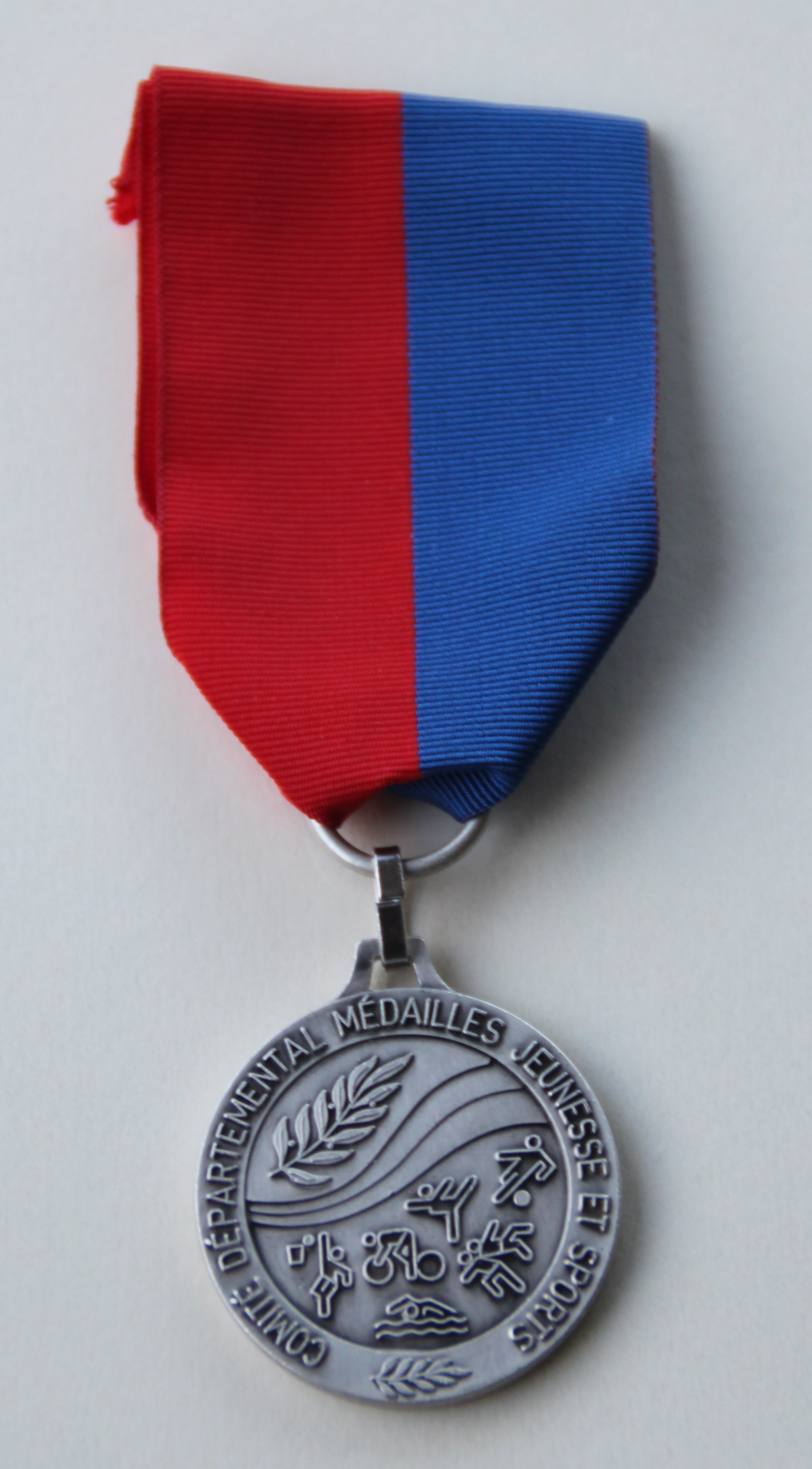 Médaille du Mérite départemental de Maine-et-Loire